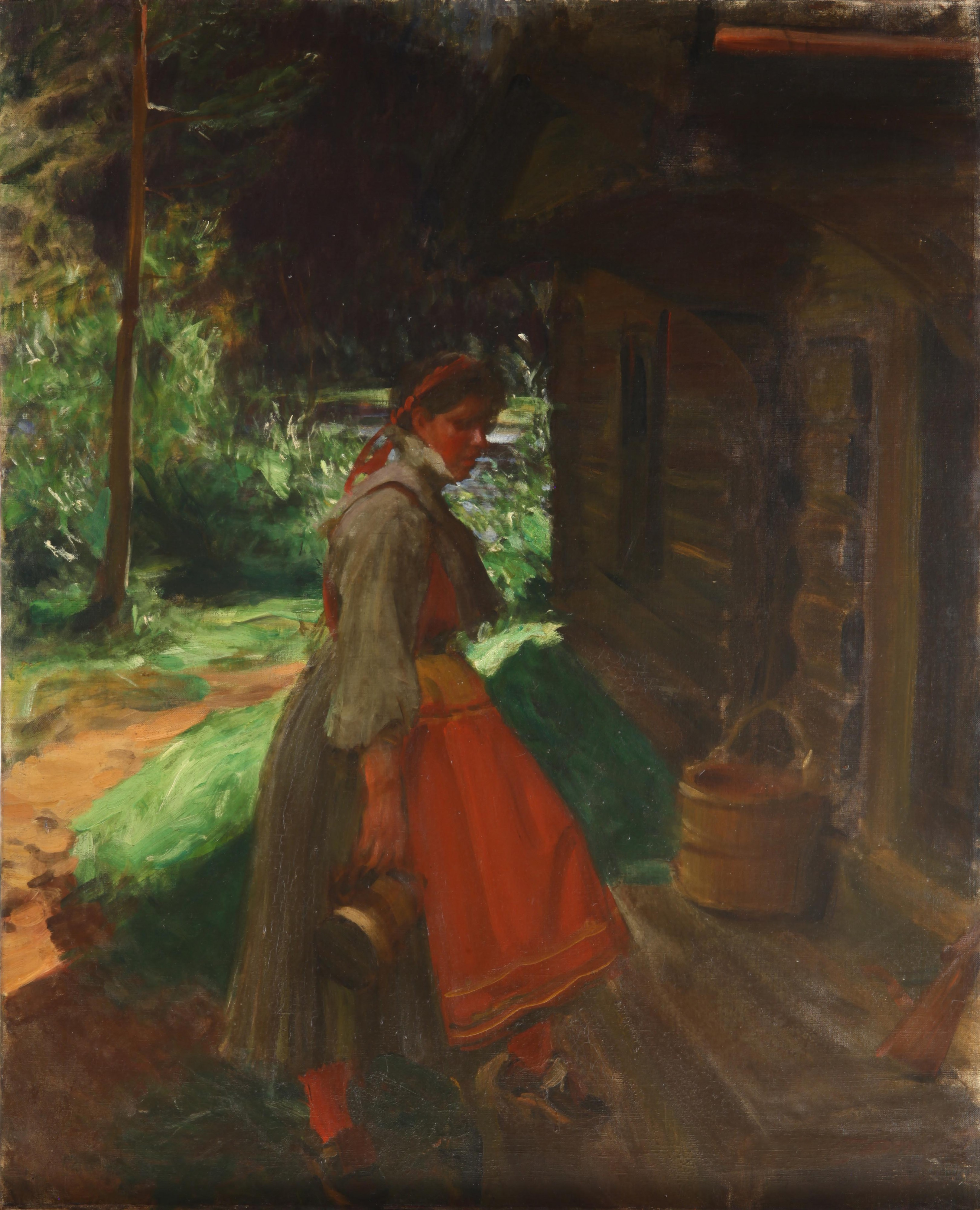 Gops Mor.